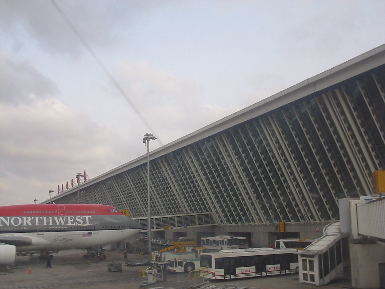 上海浦东国际机场停机坪（摄于2006年1月5日，泰国航空公司TG663航班机舱内）